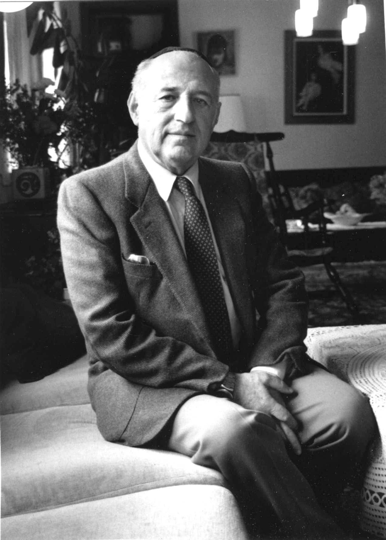 חיים קוליץ